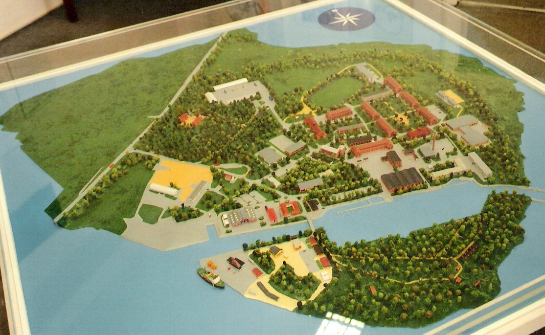 Modell der Insel Dänholm im Marinemuseum auf dem Stralsunder Dänholm, fotografiert vom im März 2006